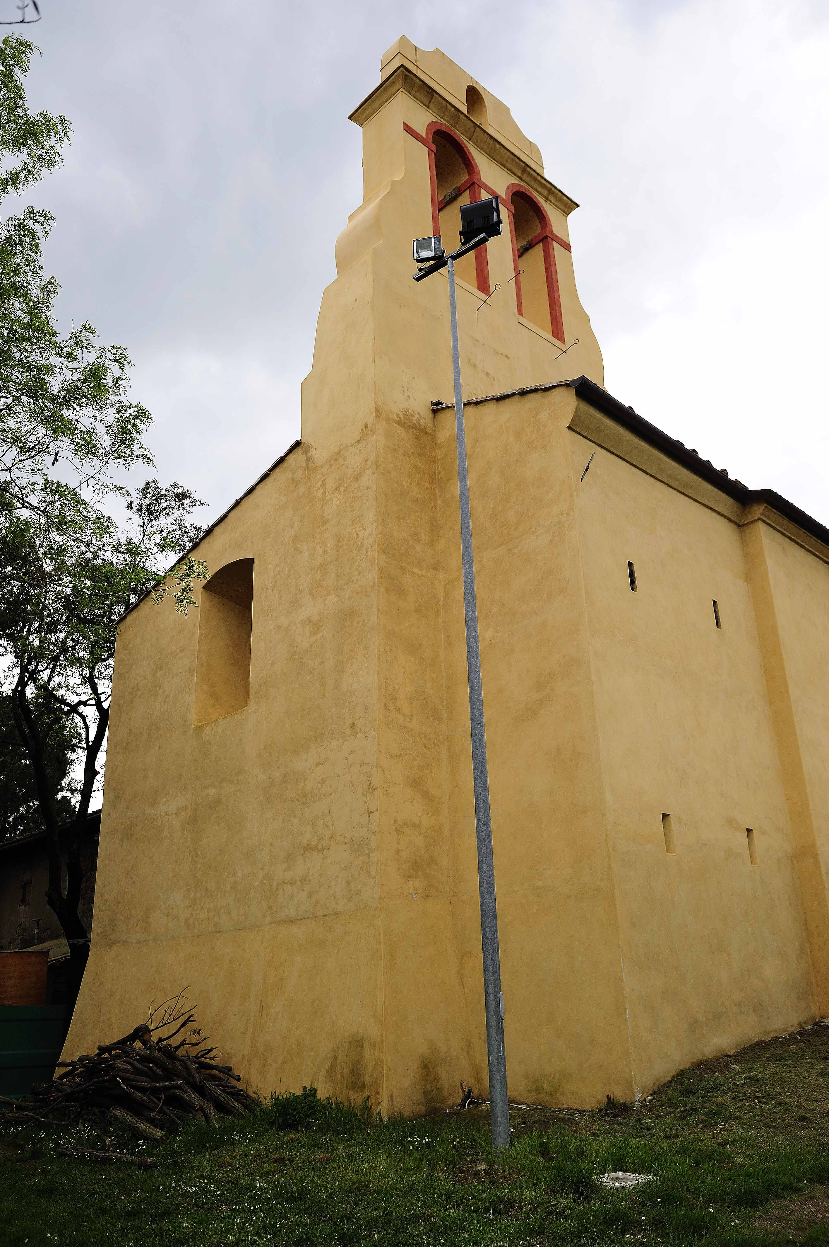 Scarsella della Pieve di Coeli Aula - Montespertoli - Firenze